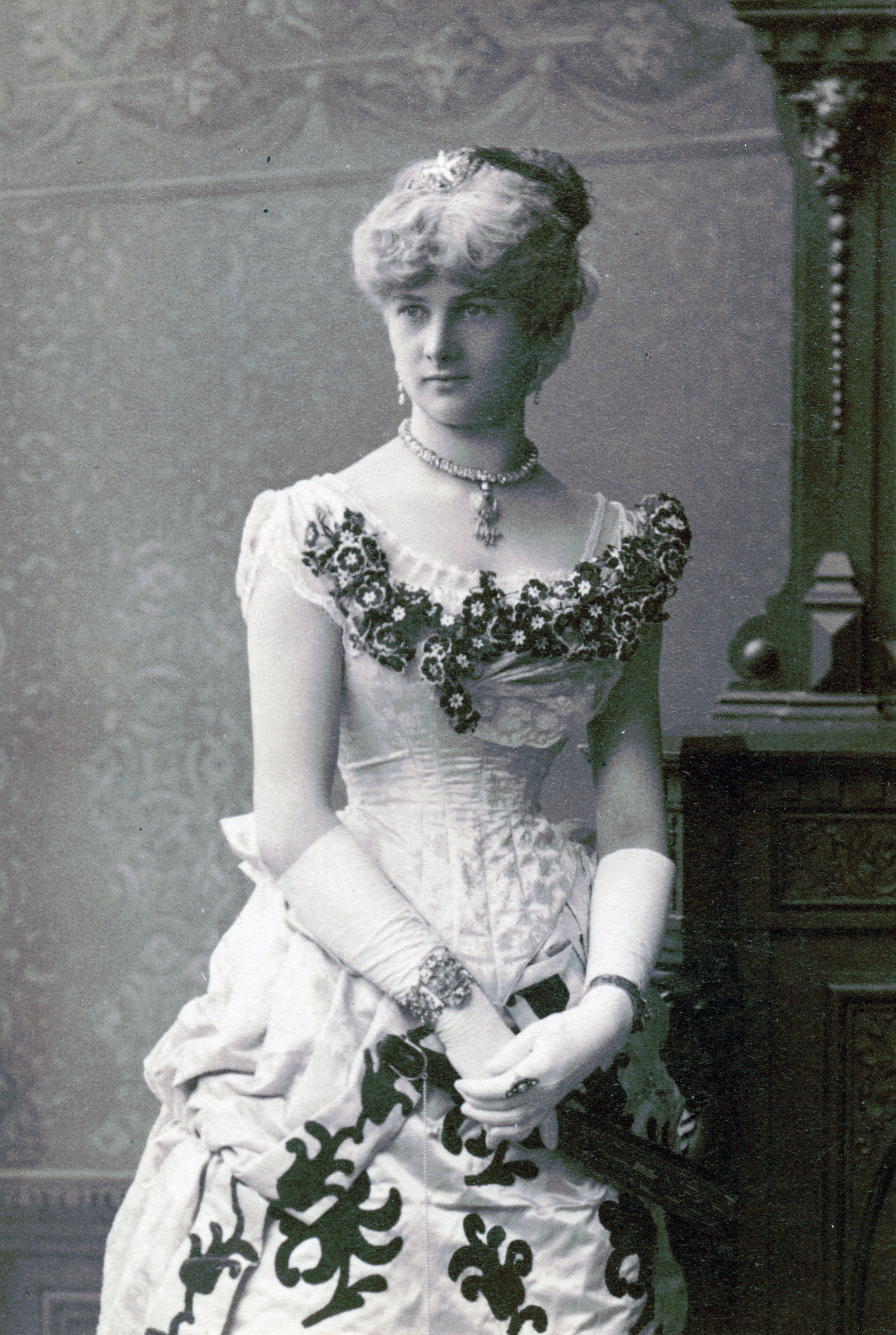 Helga Adamsen som Nadjeska i Furstinnan Gogol, Kungliga Dramatiska teatern 1883